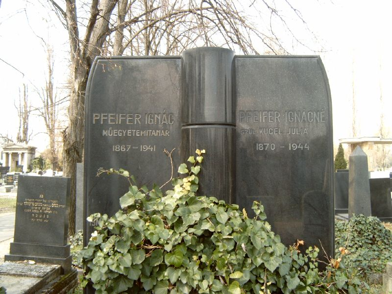 Pfeifer Ignác (Szentgál, 1868. szeptember 30. – Budapest, 1941. szeptember 7.) vegyészmérnök, műegyetemi tanár sírja Budapesten. Kozma utcai izraelita temető: 5B-10-2